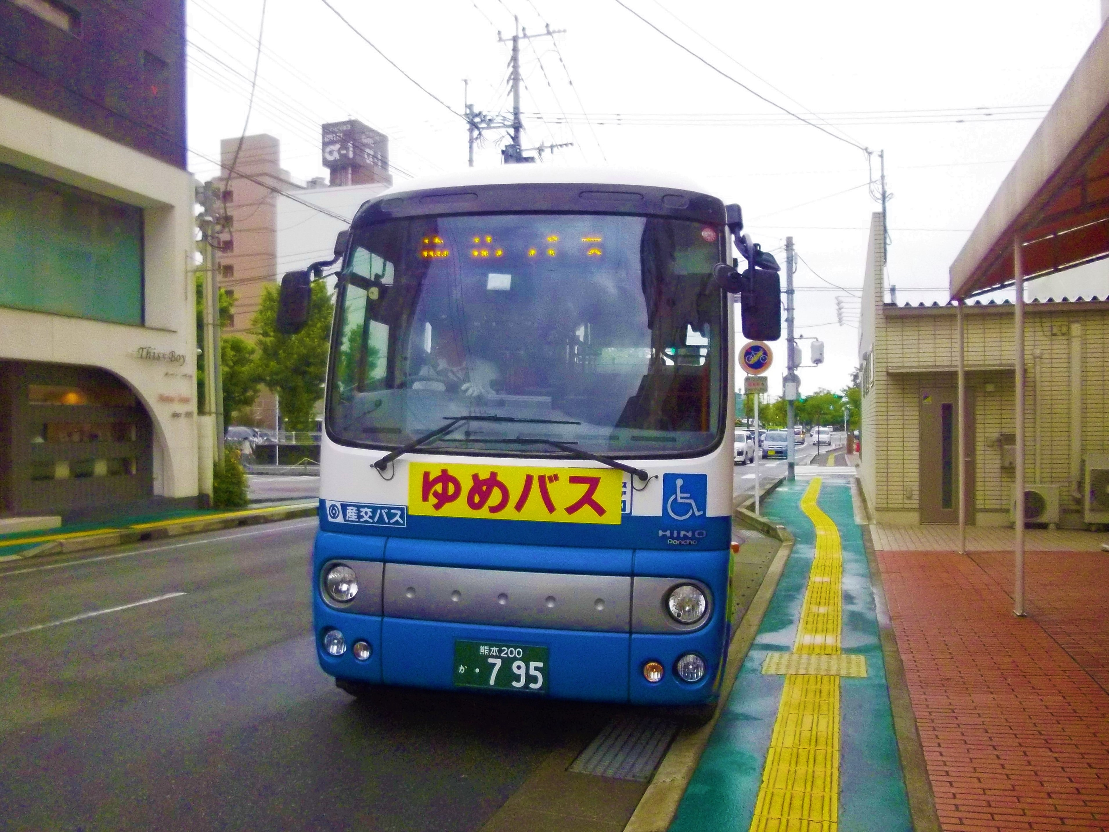 産交バスの日野・ポンチョ、八代市街地循環「ゆめバス」代走時に撮影